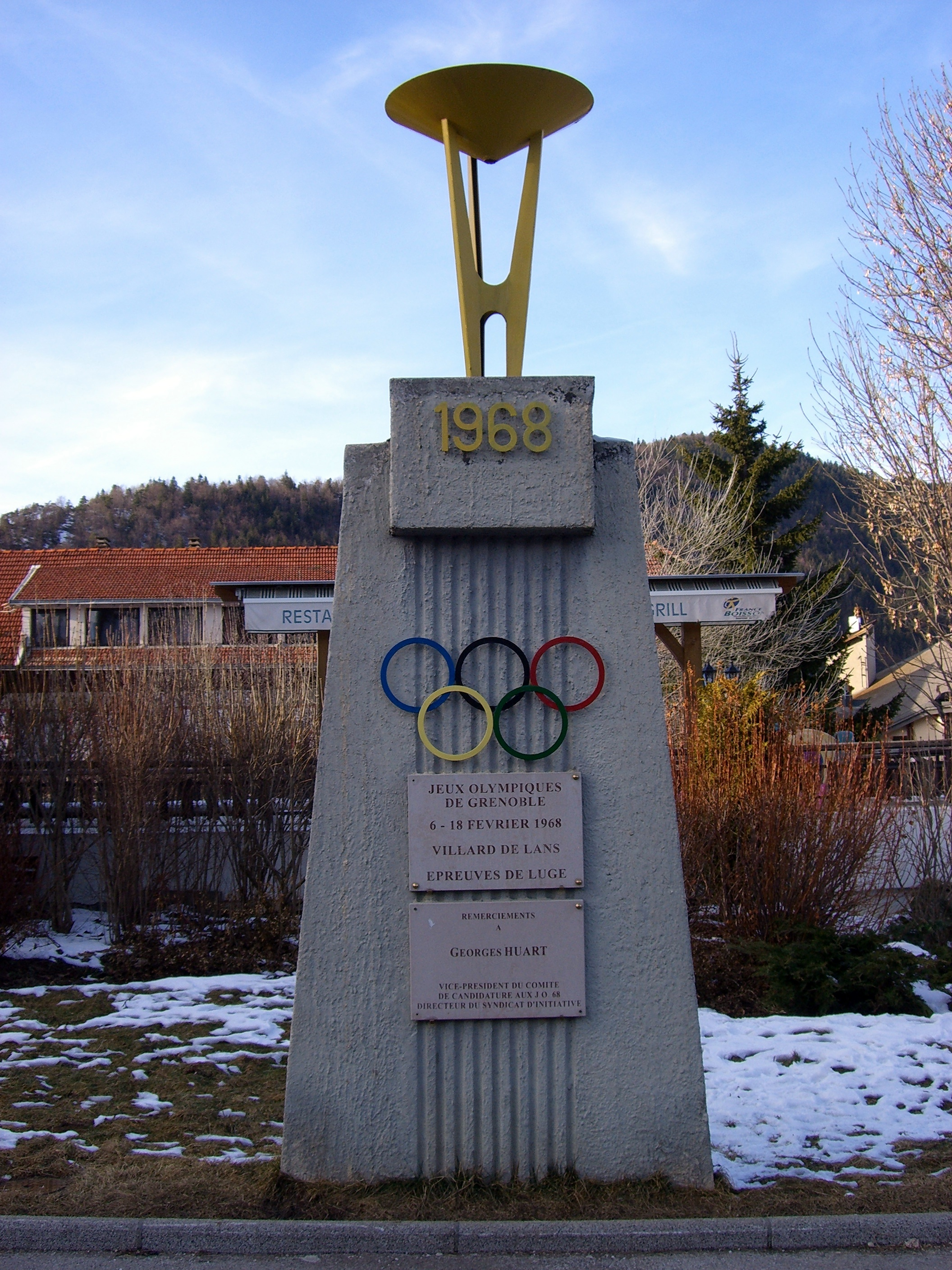 Le Monument des Jeux Olympique de GrenobleGrenoble de 1968 à Villard-de-Lans.